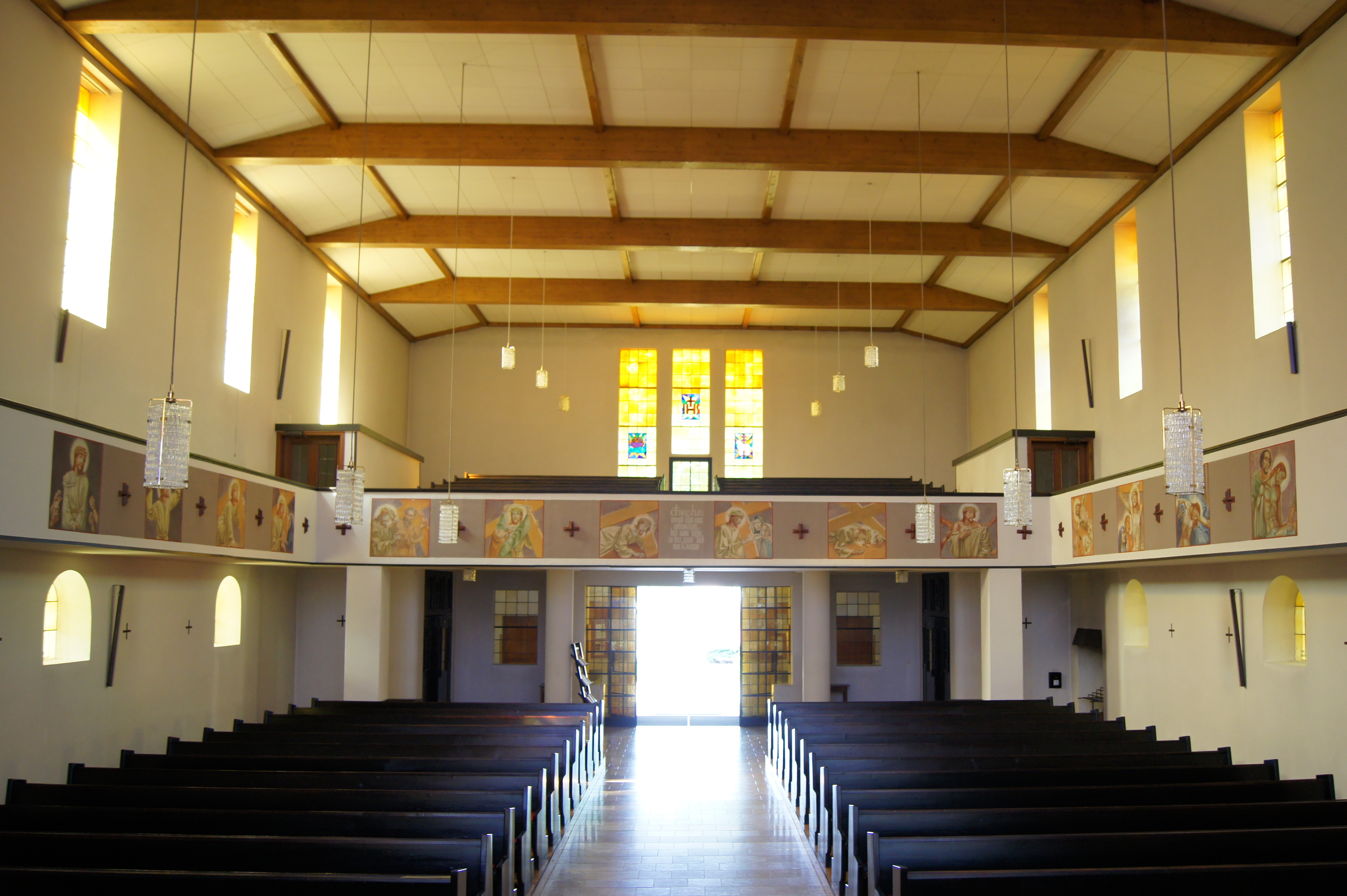 Der Innenraum der Pfarrkirche Wagram vom Altarbereich aus gesehen